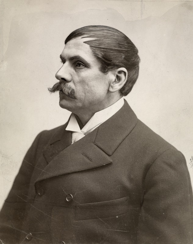 Portrett av Christian Skredsvig, mann, kunstmaler, brystbilde, halvprofil.